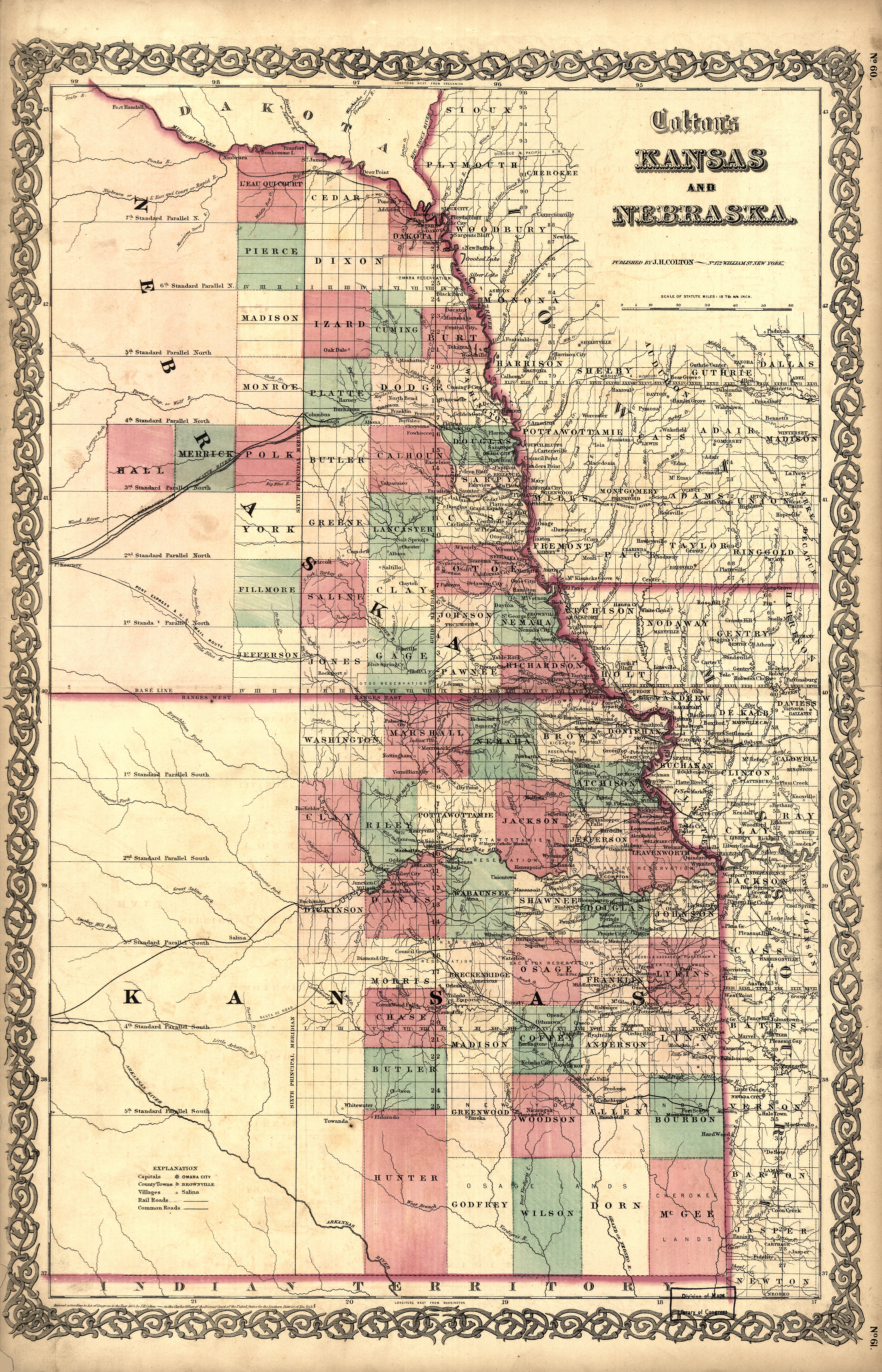 Nebraska und Kansas von J. H. Colton (1800-1893) Nebraska and Kansas. New York, 1855 Hand-colored and annotated lithograph map Geography & Map Division (49.9) [ G&M Digital ID # g4200 ct00089 ]